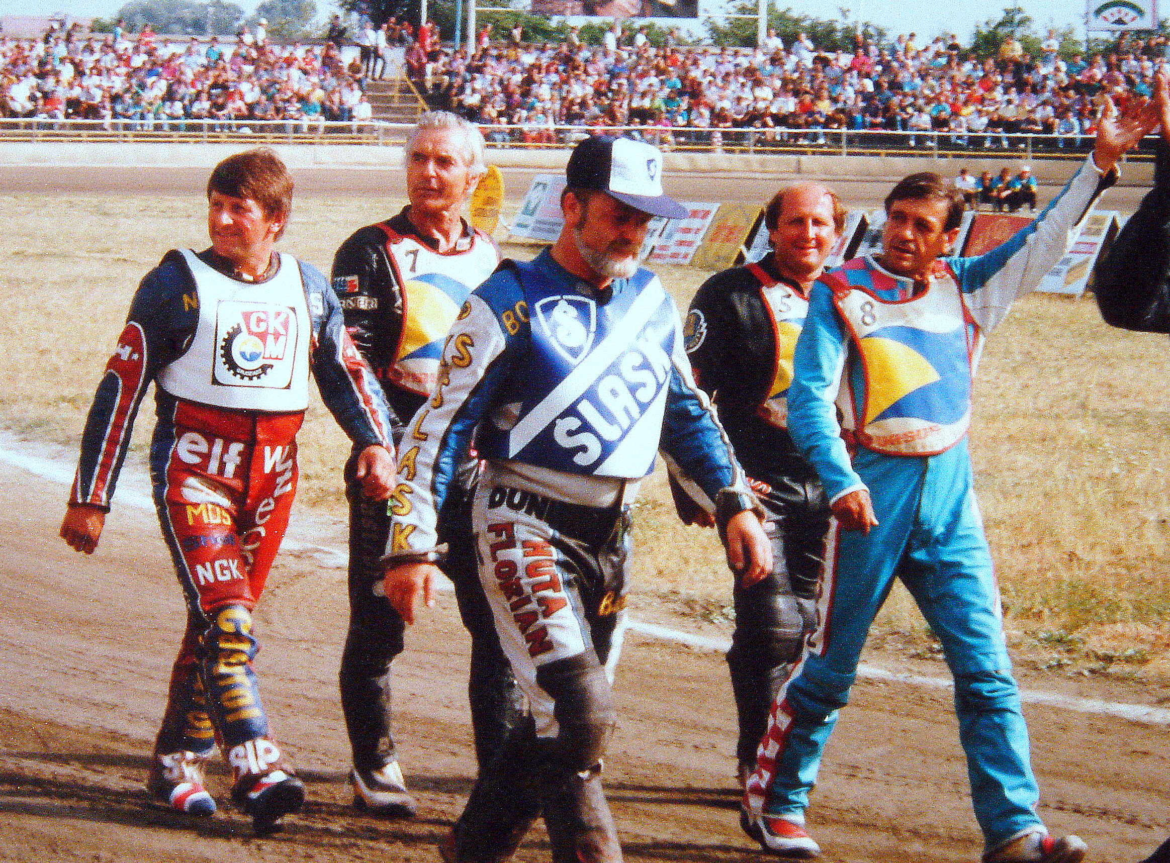 Gorzów Wlkp. - 1992 r. I Memoriał Edwarda Jancarza. W memoriale tym rozegrano także turniej oldbojów. Na zdjęciu część oldbojów podczas prezentacji: od lewej - Jan Ząbik, Andrzej Pogorzelski, Erwin Brabański, Marek Cieślak i Jerzy Padewski